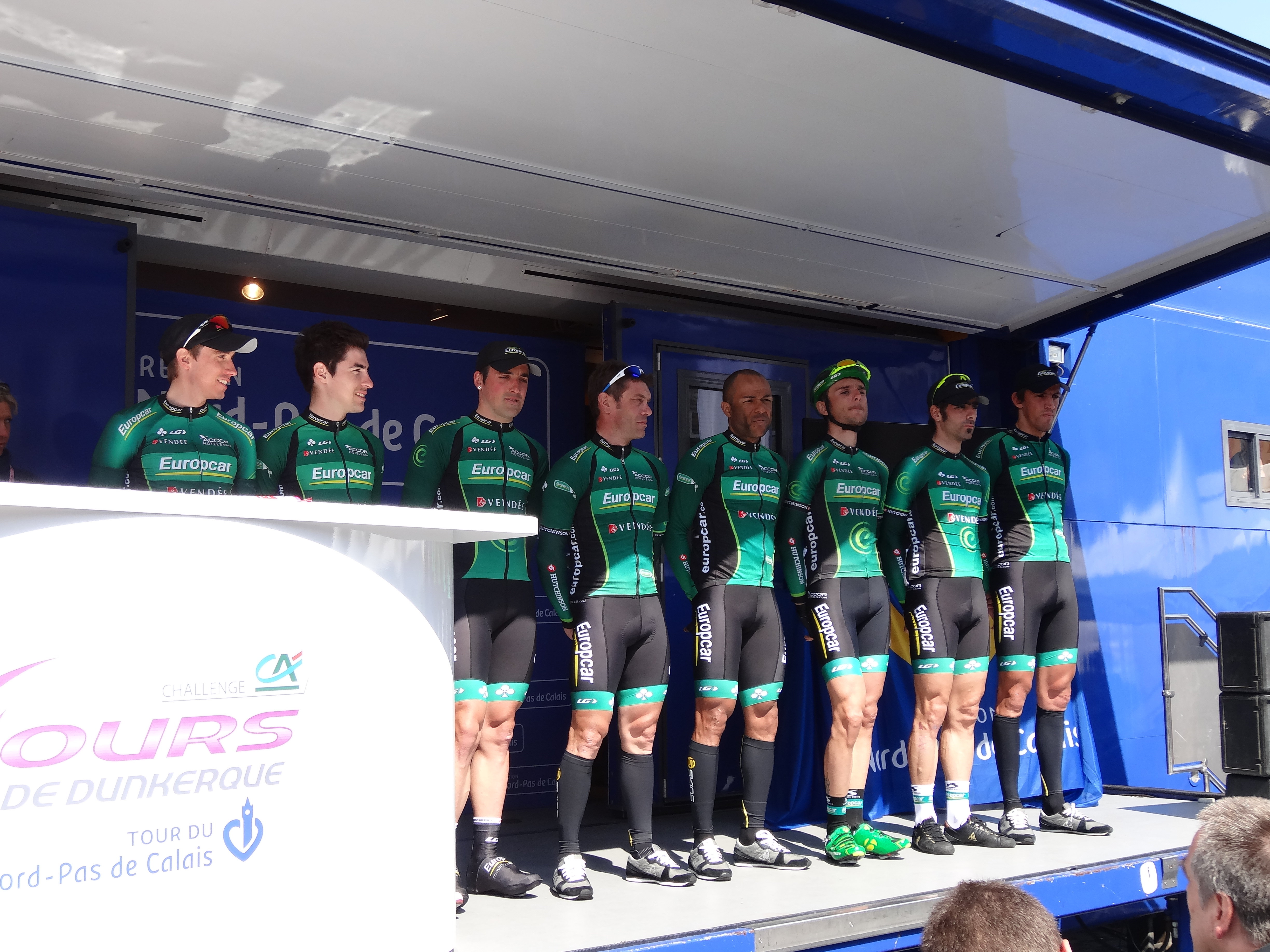 Reportage photographique réalisé le mercredi 1er mai 2013 au départ de la première étape de l'édition 2013 des Quatre jours de Dunkerque à Dunkerque, Nord, Nord-Pas-de-Calais, France. Le dossier photographique montre des véhicules de course exposés, la caravane publicitaire, la présentation des coureurs, et le départ. Depicted people: Angélo Tulik, Perrig Quéméneur, Sébastien Turgot, Franck Bouyer, Yohann Gène, Vincent Jérôme, Jérôme Cousin and Damien Gaudin